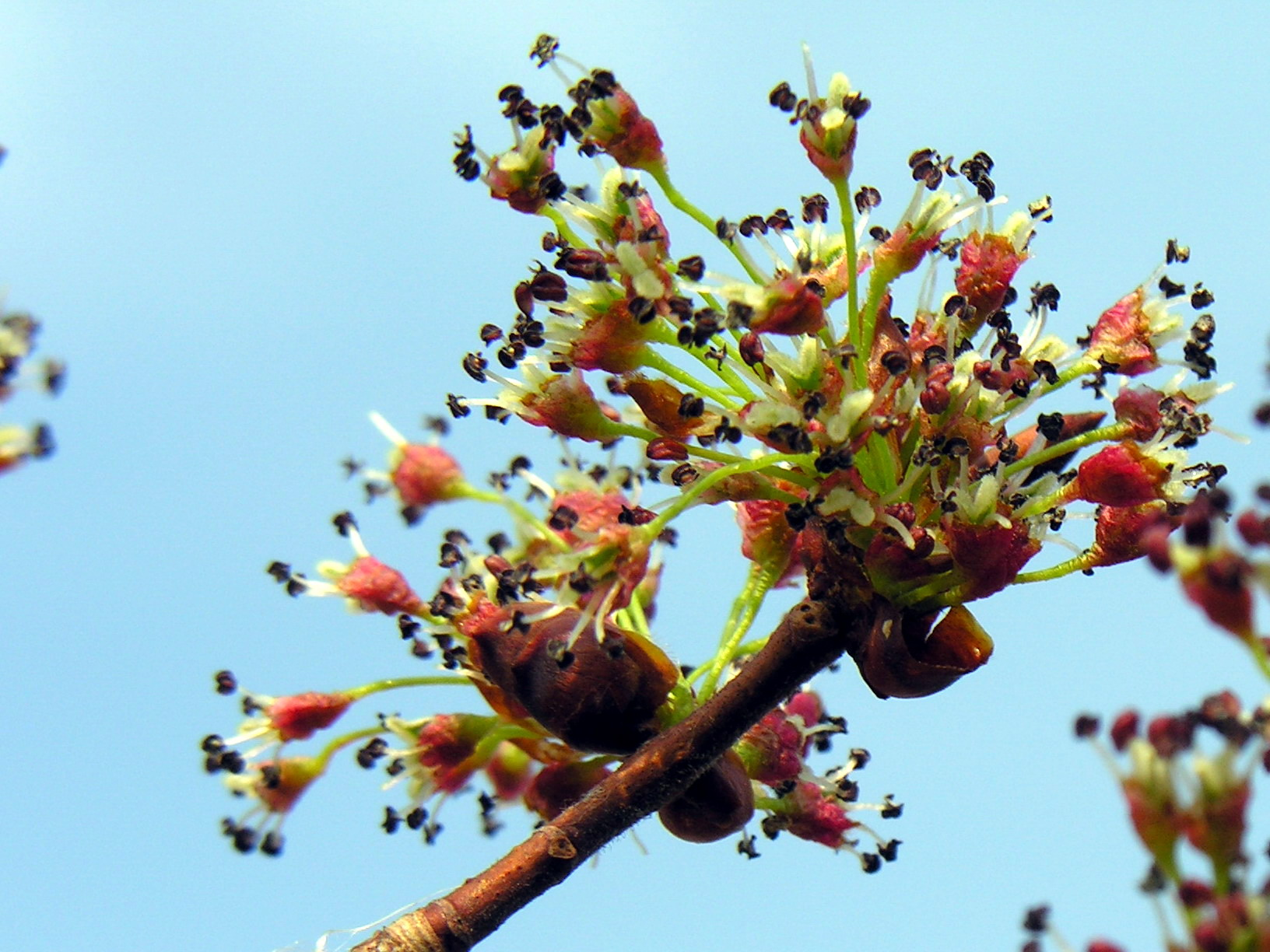 Žydinti paprastoji vinkšna (Ulmus laevis) Šeima. Guobiniai (Ulmaceae) Foto: Algirdas, 2006 m. balandžio 28 d.